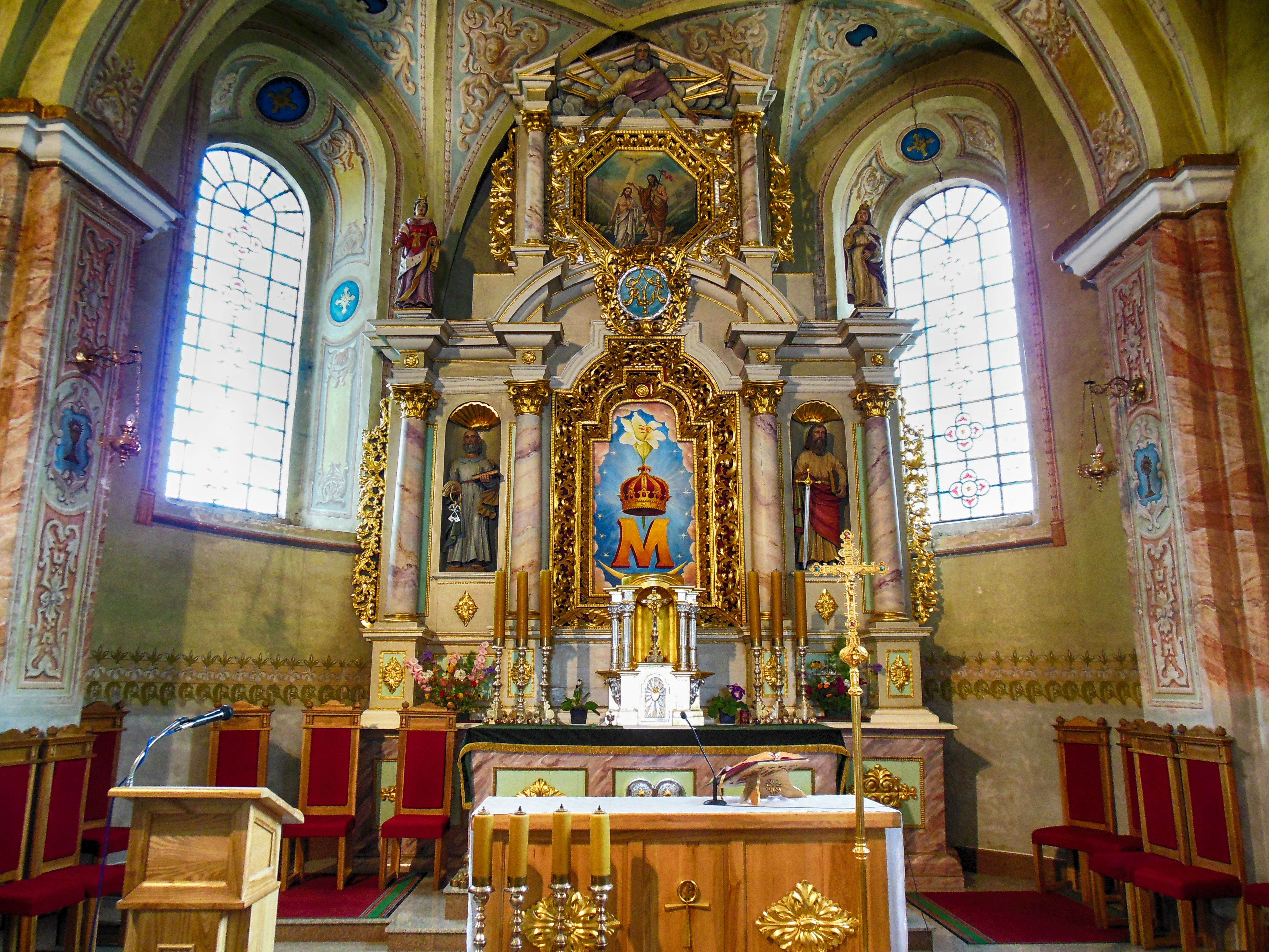 Беларуская (тарашкевіца): Касьцёл Сьвятога Яна Хрысьцiцеля, дэкаратыўнае аздабленьне інтэр’ера касьцёла: росьпісы скляпеньняў, алтары, арган, хоры. в. Камаі This is a photo of Belarusian heritage monument. Reference number: 212Г000593 ( WLM)